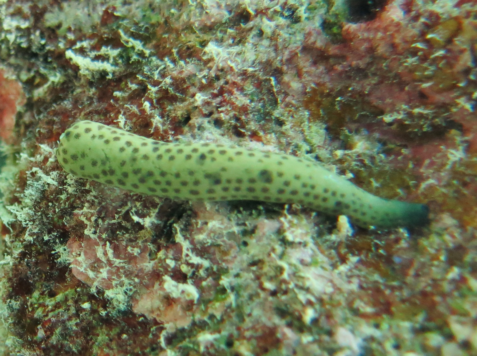 Un bras isolé d'étoile "comète de mer" (Linckia multifora), continuant à vivre après scission et prêt à régénérer une étoile complète. Spécimen photographié aux Maldives (Landaagiraavaru, atoll de Baa).